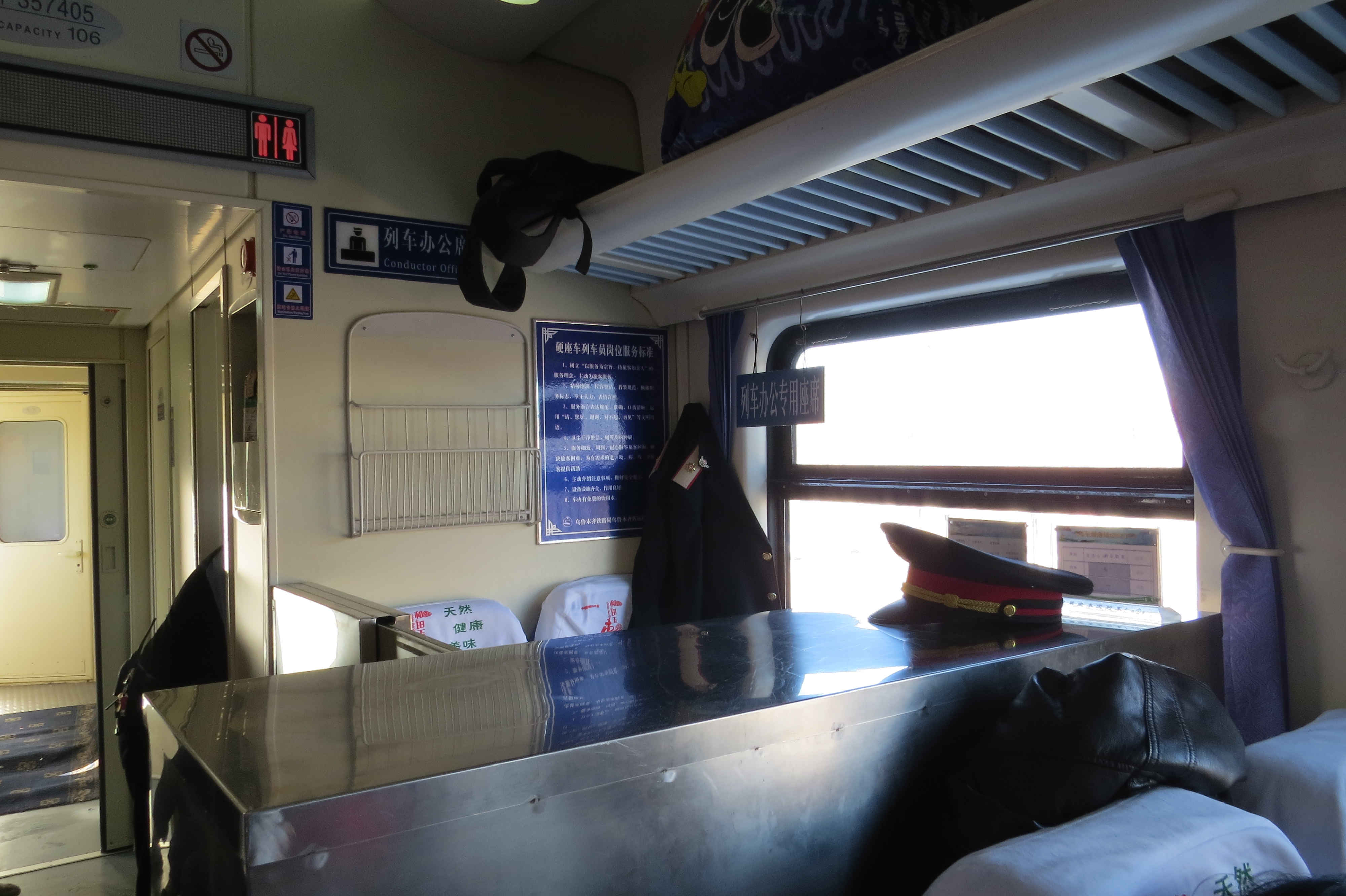 中文（中国大陆）: Z70次列车的列车长办公席